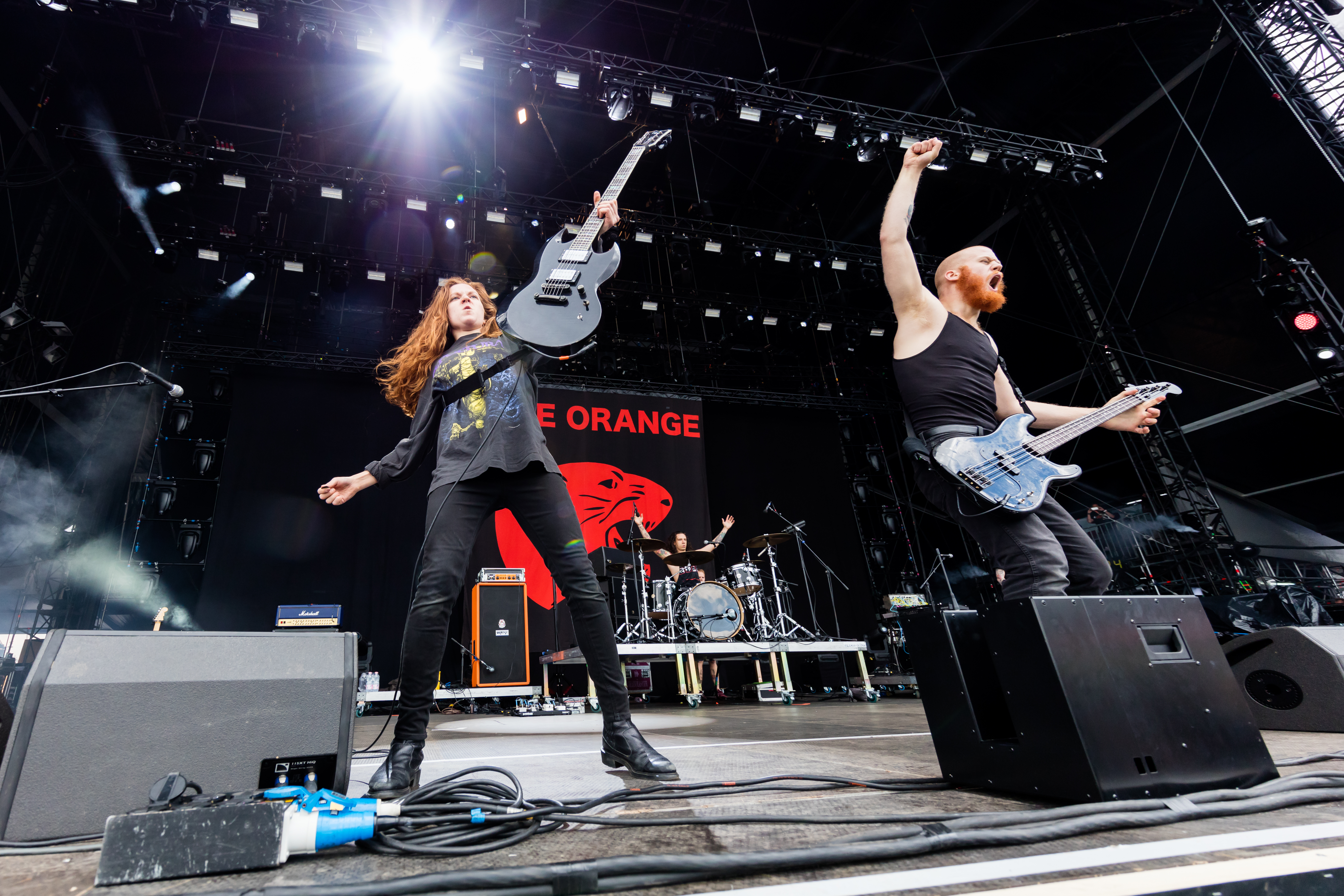 Code Orange during Rock am Ring at Nürburgring, Nürburg, Rheinland Pfalz, Germany on 2017-06-04, Photo: Sven Mandel